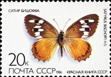 Почтовая марка СССР. Сатир Бишоффа. Номер в каталоге ЦФА 5709